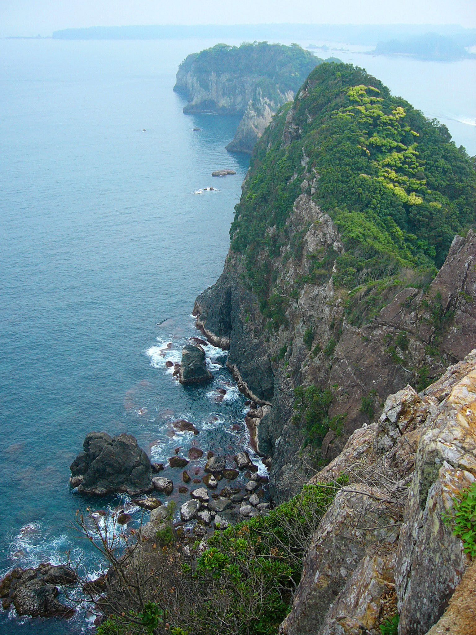 Noroshi Peninsula in Nachikatsuura, Wakayama